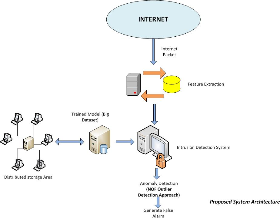 Predlagana arhitektura sistema